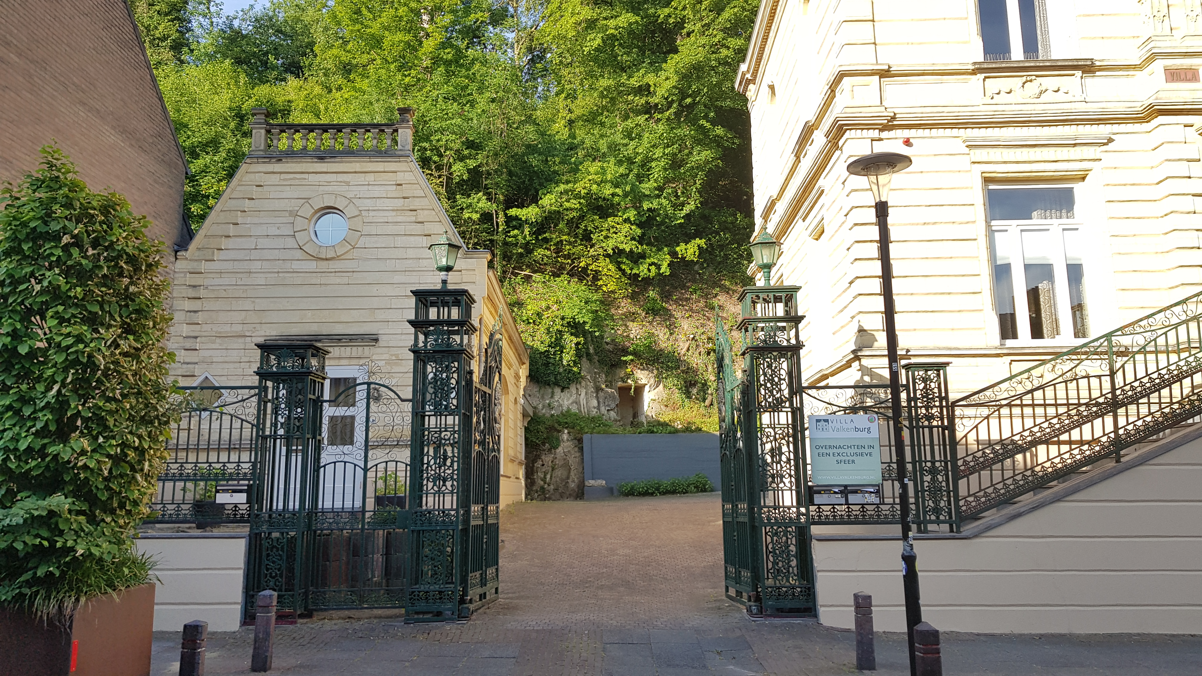 Bergkelders Villa Alpha, Valkenburg aan de Geul, Nederland